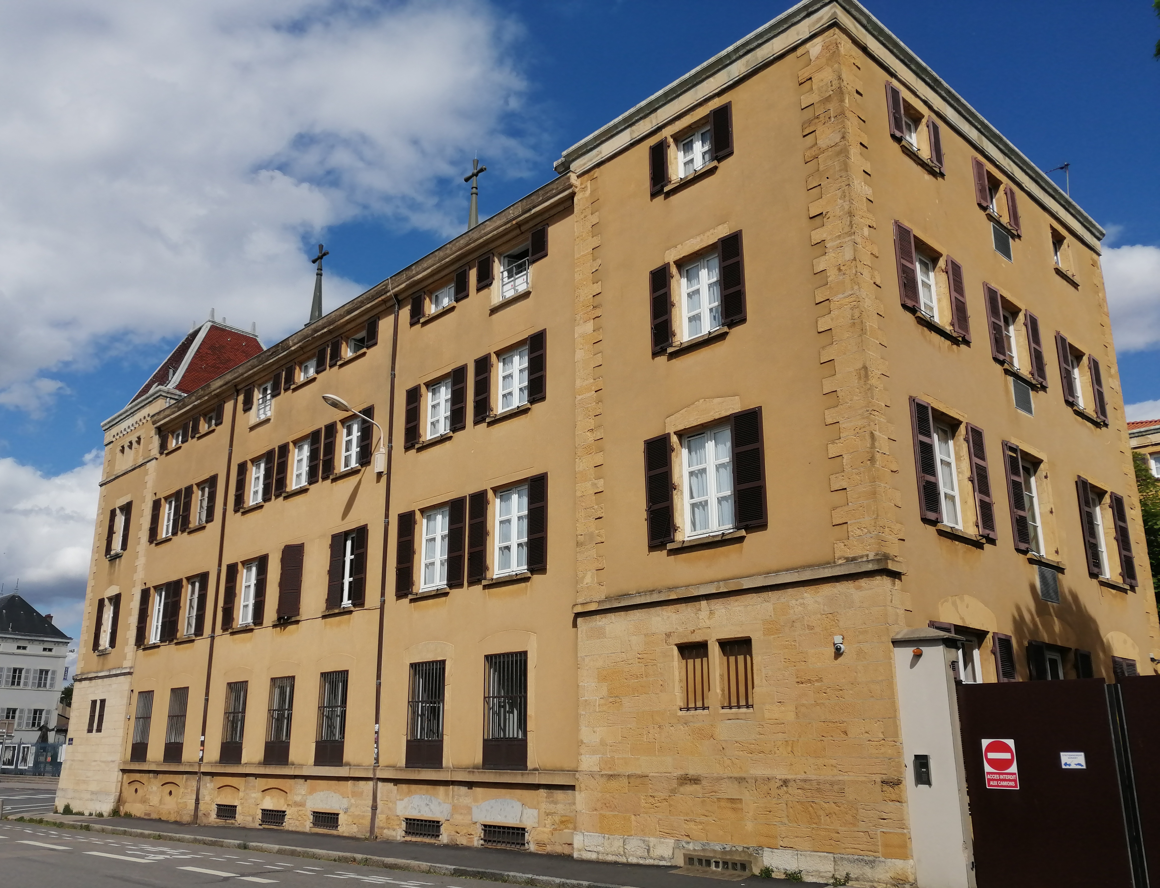 Maison des Sœurs du Cénacle à Fourvière _ Lyon